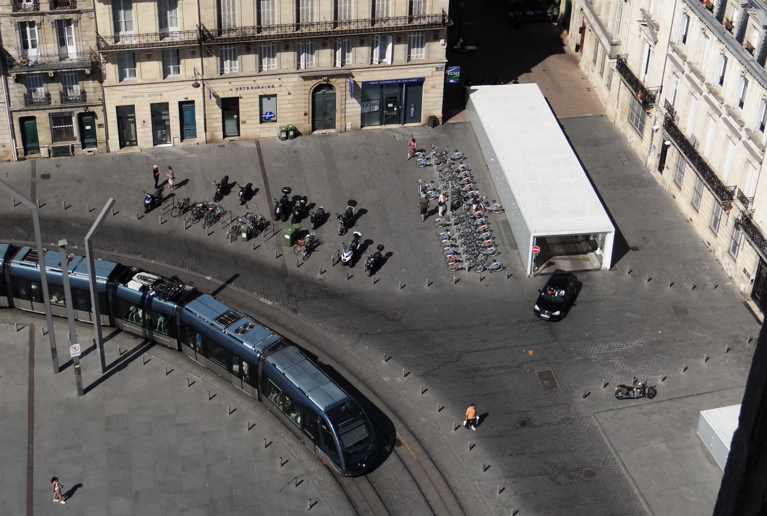 Divers modes de transport sur la place Pey-Berland à Bordeaux en août 2016 : tram de la ligne B approchant de la station Hôtel de Ville, motos, voiture sortant d'un parking souterrain, vélos et station de vélos en libre service, piétons.